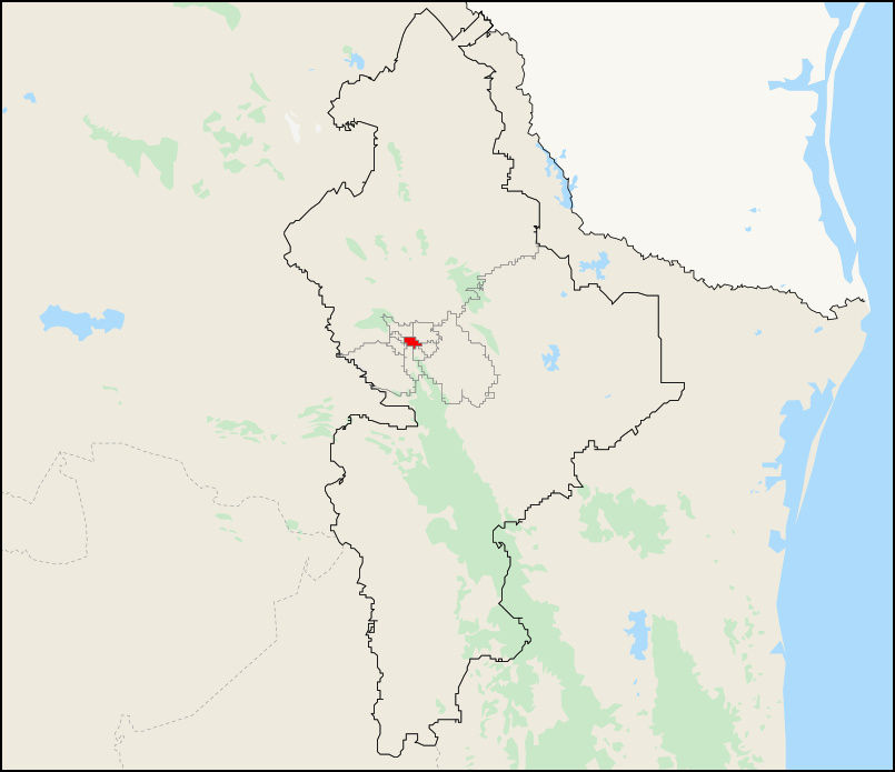 Mapa del distrito electoral federal 4 ubicado en Nuevo León